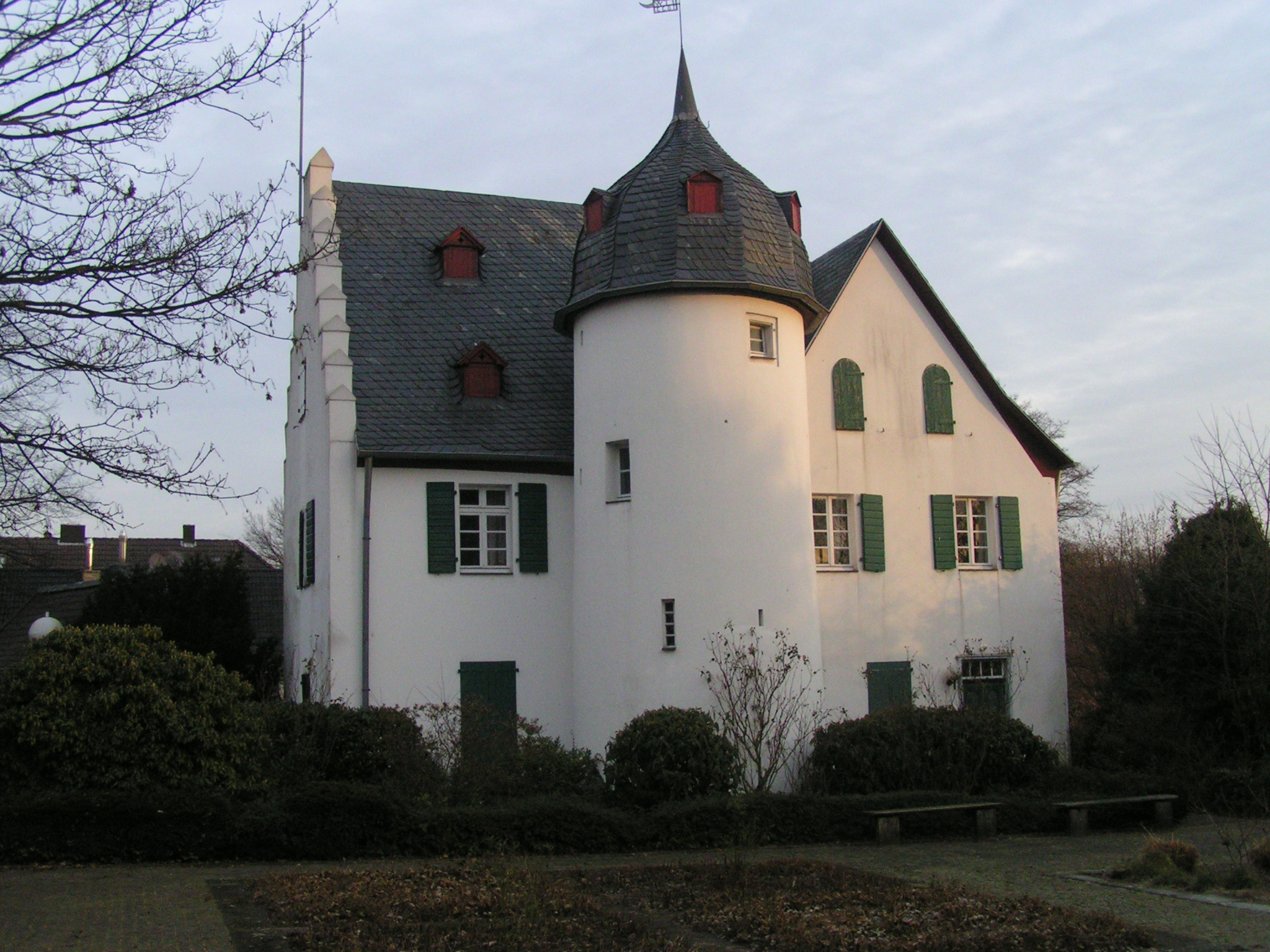 Friedenberger Hof in Leverkusen-Opladen. Eines der ältesten Gebäude der Stadt.